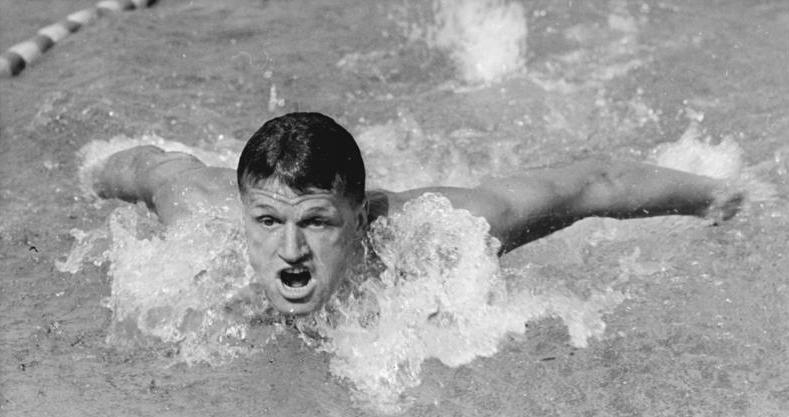 Horst-Günter Gregor ADN-ZB Mittelstädt 5-11-71-Leipzig: Horst Günter Gregor kandidiert für den Bezirkstag-1967 stand Horst Günter Gregor - über ein Jahrzehnt gehörte er zu den besten Schwimmern der DDR, errang drei Silbermedaillen bei Olympischen Spielen und zwei Europameistertitel - zum ersten Mal auf der Kandidatenliste der Nationalen Front für den Bezirkstag Leipzig. Am 14. November kandidiert der gelernte Maurer, jetzige Bauingenieur und Diplomsportlehrer, erneut für den Bezirkstag Leipzig. Er möchte sich besonders für den Lehrlings- und Studentensport, sowie für den Volkssport einsetzen. (Foto von einem früheren Wettkampf)